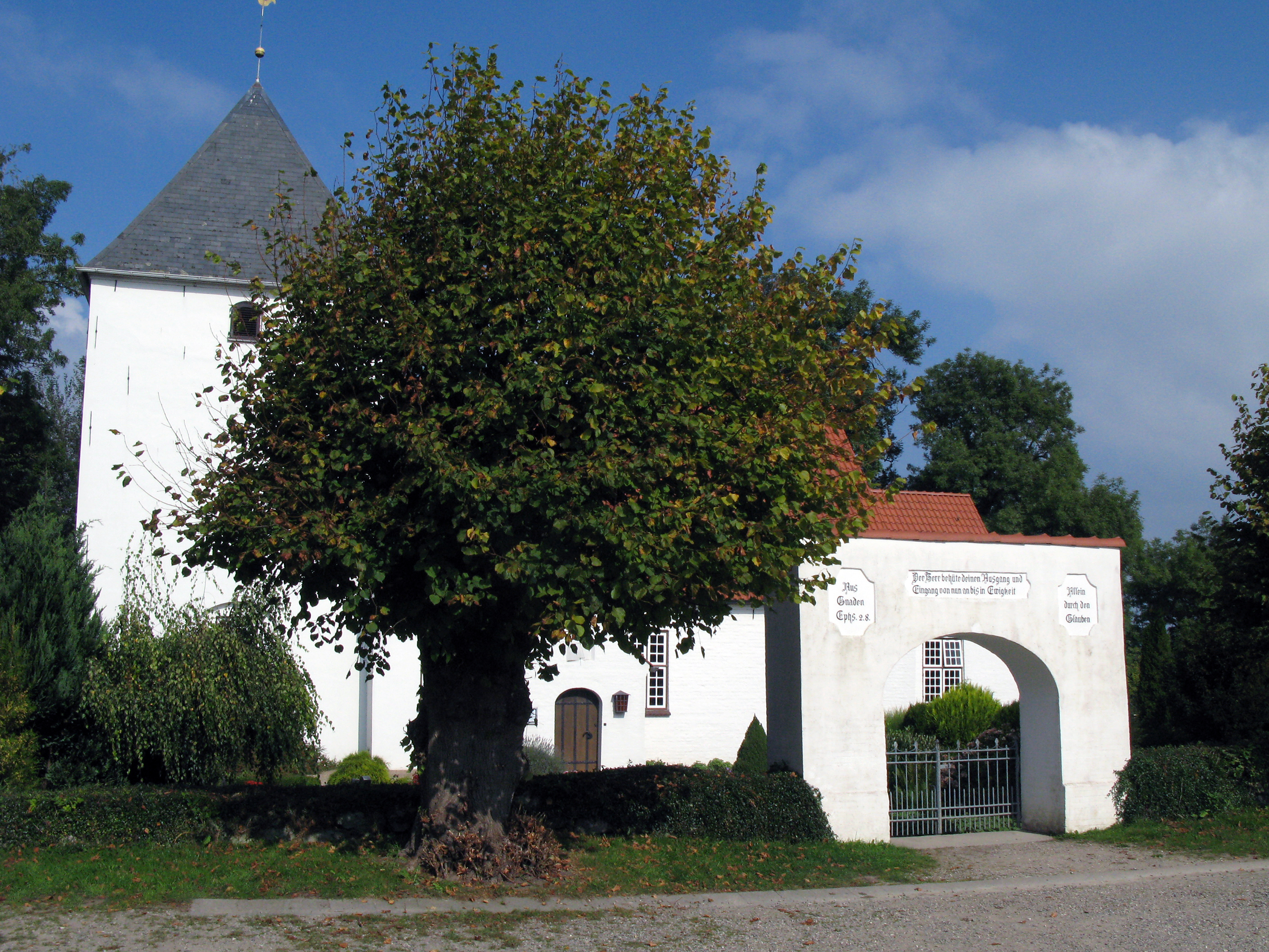 Neukirchen, Kirche mit Linde und Kirchhofstor